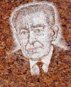 Prof. Stefan Kownas (1898-1978) – wybitny polski botanik, jeden organizatorów Wyższej Szkoły Rolniczej w Szczecinie (późniejszej Akademii Rolniczej) - obecnie ZUT. Zdjęcie pochodzące z tablicy na gmachu Gimnazjum Nr 6 w Szczecinie.